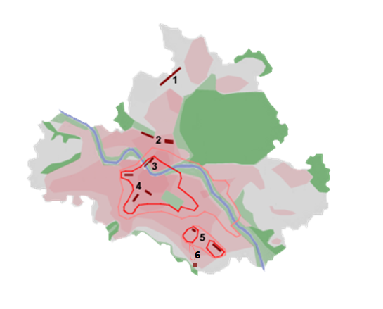 Zeigt die Zielgebiete bei den Bombenangriffen auf Dresden (rot markiert sind Kernbereiche) Strategische Ziele: 1: Flugplatz Klotzsche (heute Flughafen Dresden) 2: Albertstadt (Garnisons- und Kasernenkomplex) 3: Bahnhof Dresden-Neustadt und Marienbrücke 4: Güterbahnhof Friedrichsstadt, Bahnbetriebswerk Altstadt und Hbf 5: Industrie in Reick und Niedersedlitz 6: Kaserne in Nickern Bildgrundlage: Grün: Parks, Wälder Rosa: Bebaute Gebiete Grau: Leicht bebaut, Brachen, Landwirtschaft Allgemein: Das Bild zeigt das Dresdner Gebiet um 2005; 1945 waren einige Teile - die auch angegriffen wurden - nicht eingemeindet.